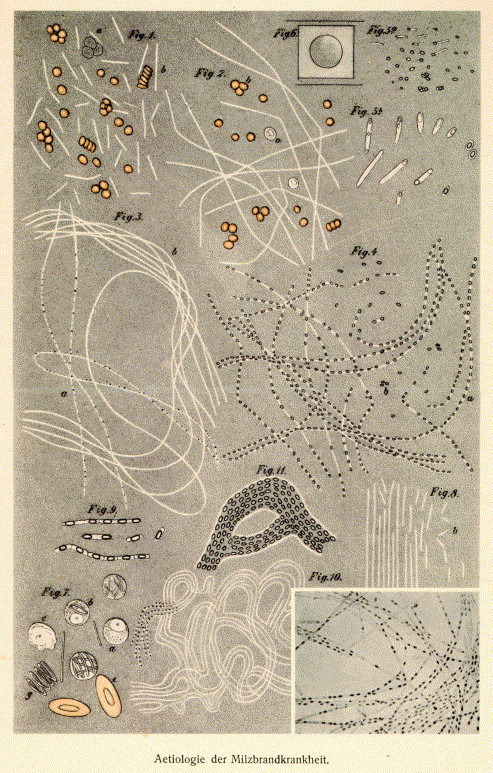 Die Aetiologie_der_Milzbrandkrankheit, von Robert Koch